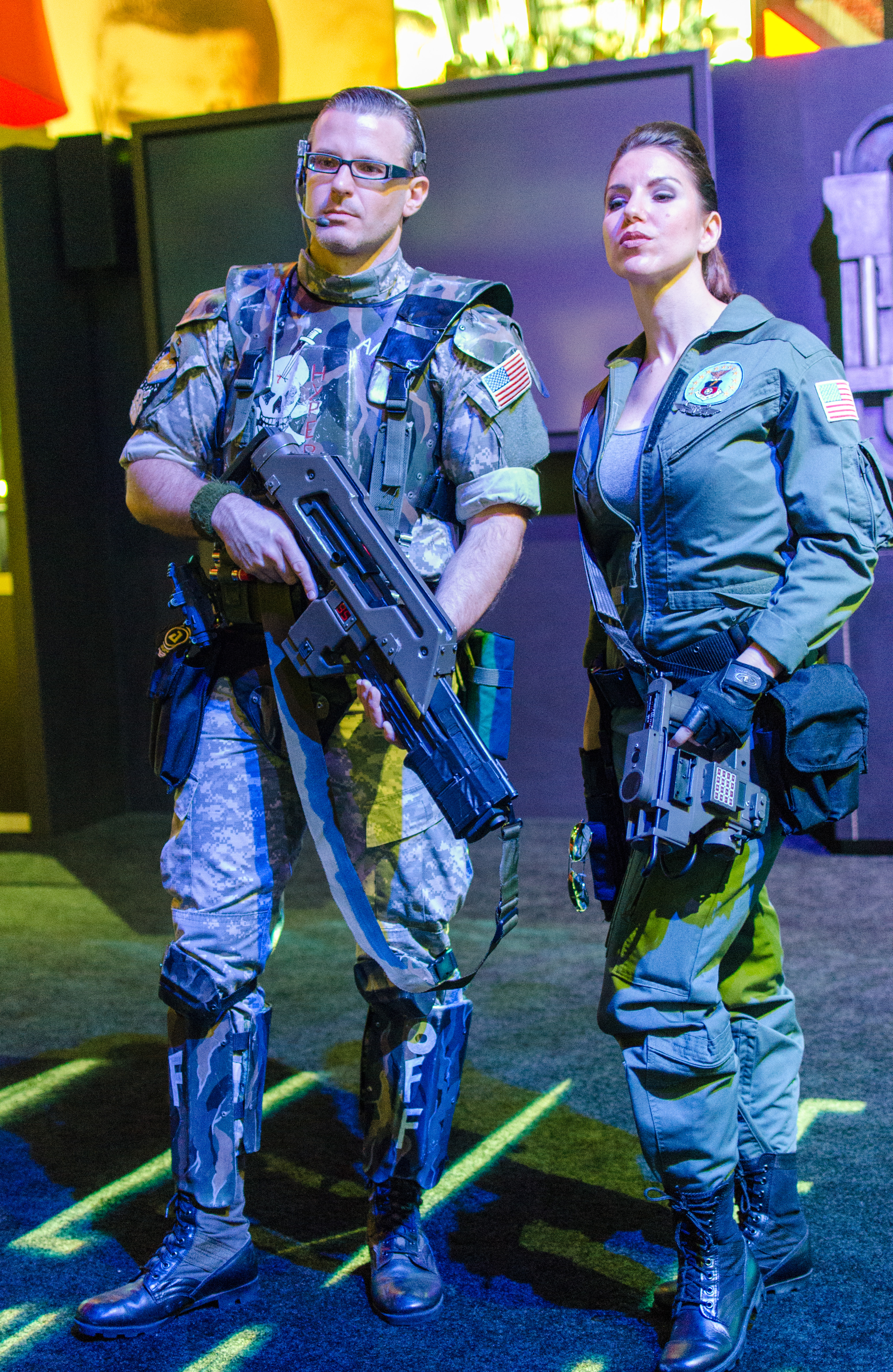 Aliens: Colonial Marines at E3 2012